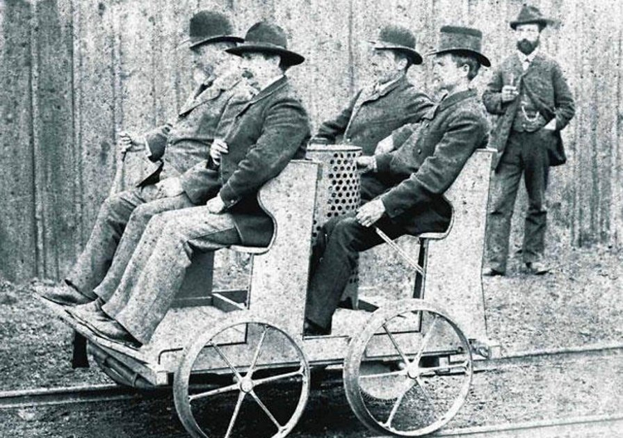 Die Daimler Motor-Draisine erstmals im Sommer 1887 zwischen Esslingen und Kirchheim/Teck erprobt